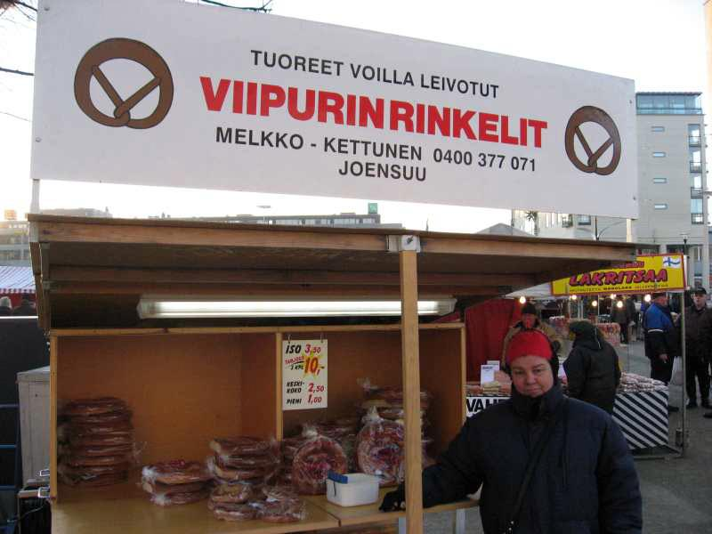 Viipurinrinkeli